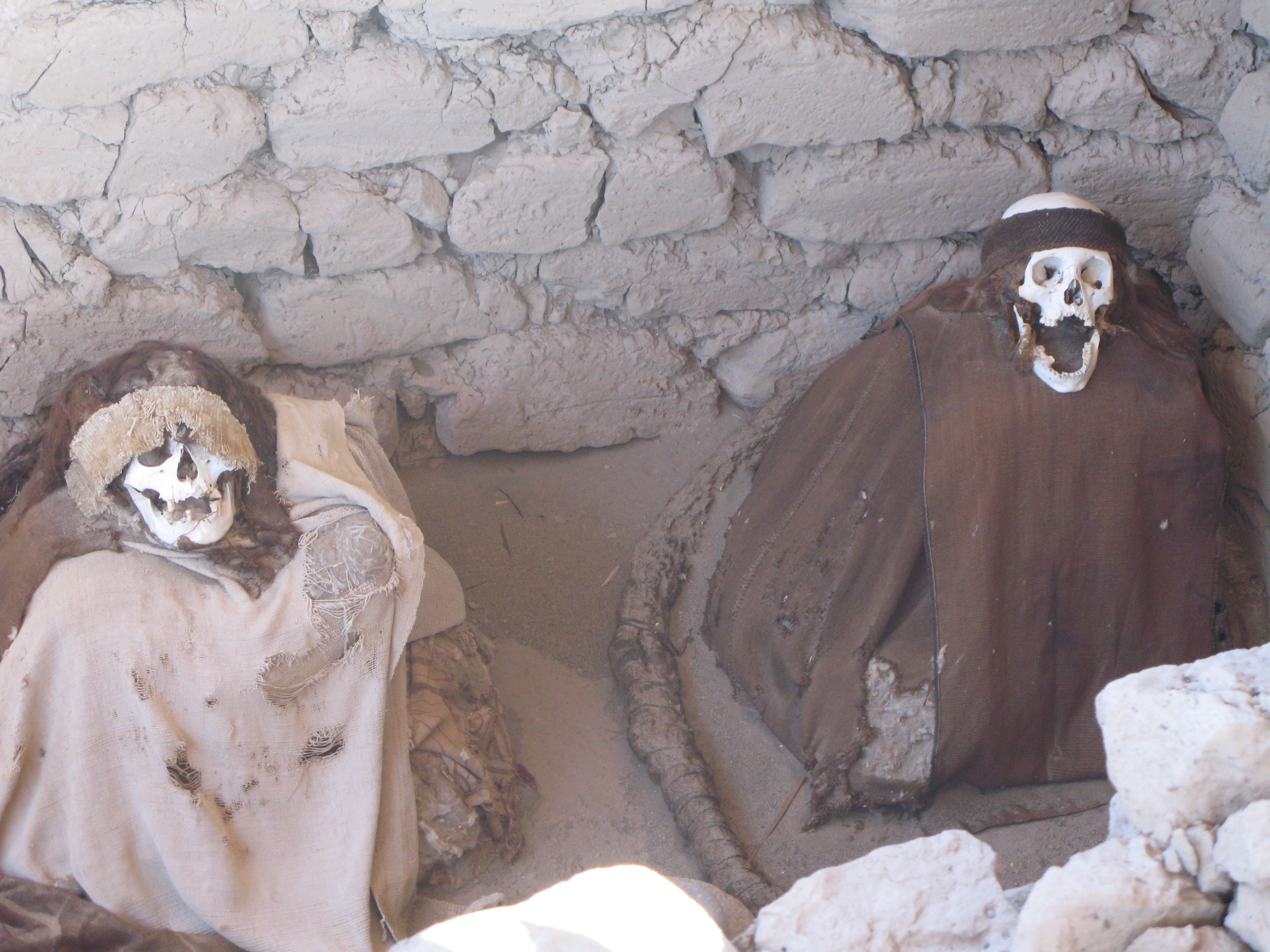 Dobro ohranjeni ostanki iz groba kulture Nazca